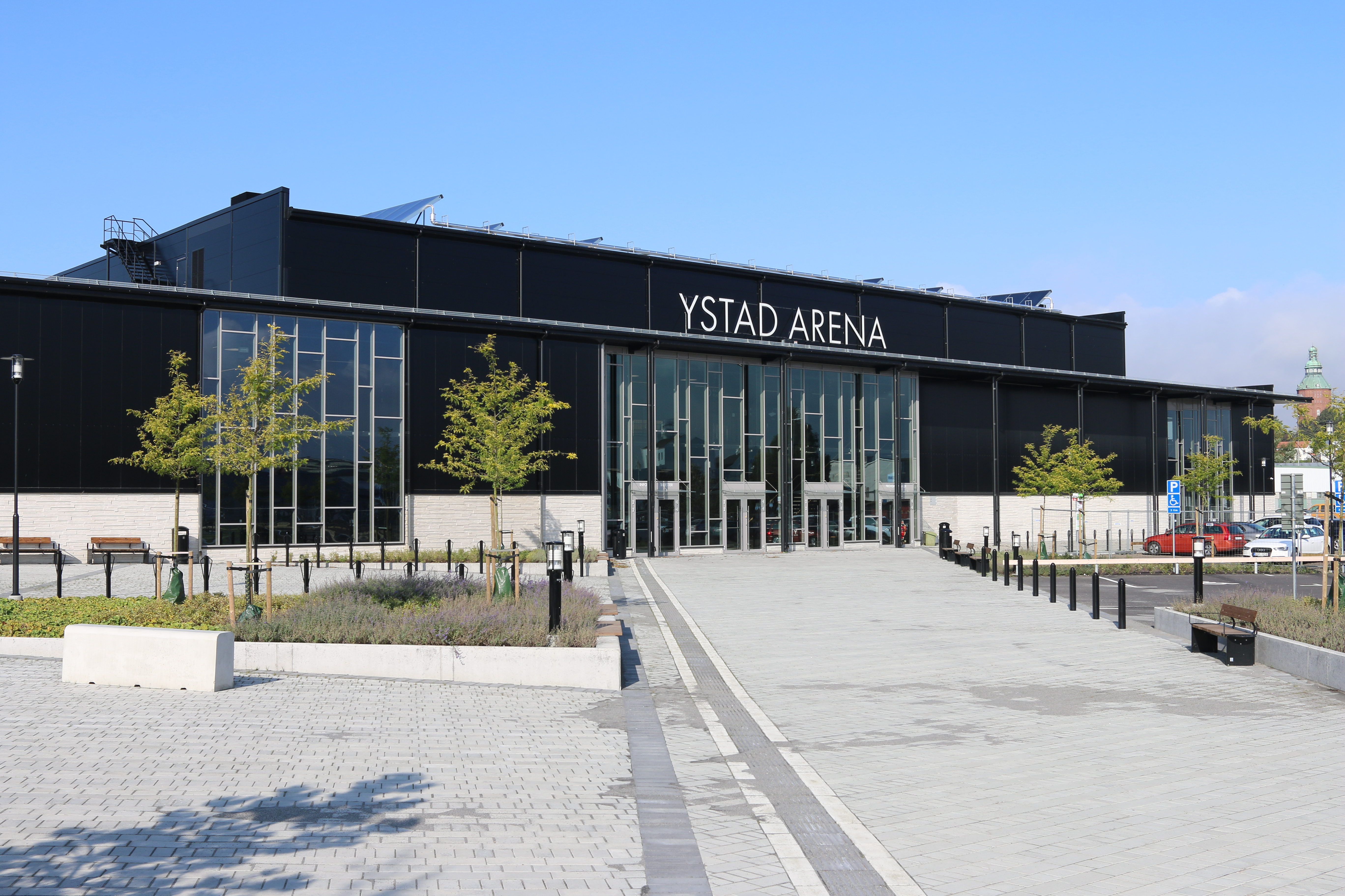 Ystads Arena 2017